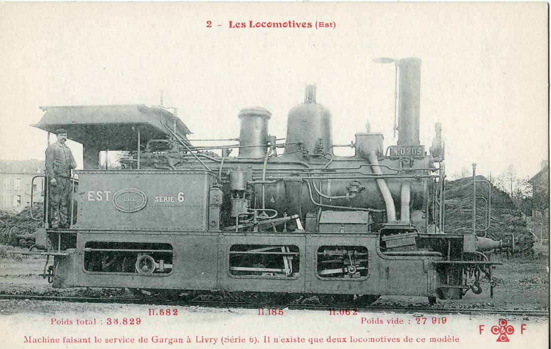 Carte postale ancienne éditée par CCCC N°2 Locomotive 0.203 'l'Ill) du tram de GARGAN-LIVRY.